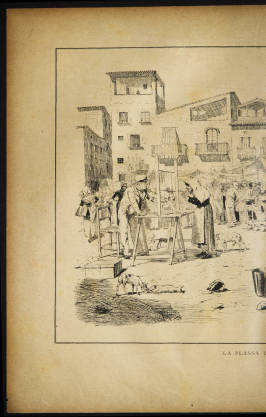 Ilustració Catalana, primera època, número 125 Data: 31 de Desembre de 1884 pàg. 376